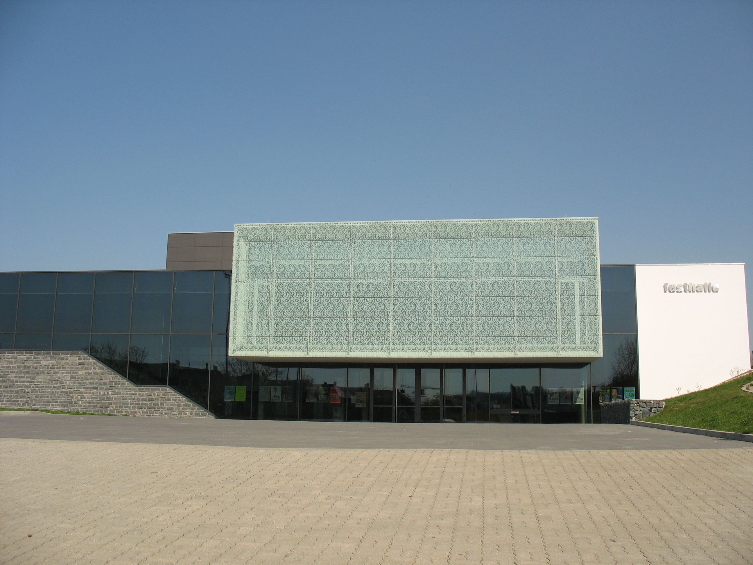 Plauen, Portal der Festhalle an der Äußeren Reichenbacher Straße.